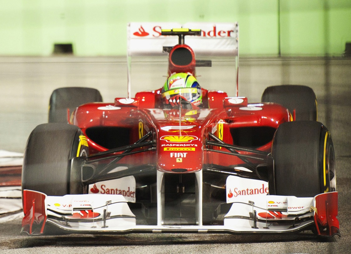 Singapore 2011 Photography By : Dhonsky